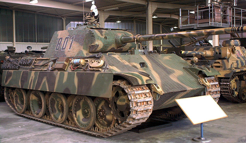 Panzerkampfwagen V Panther (Ausführung G /SdKfz 171) mit 7,5-cm-KwK 42 L/70 der derzeit besterhaltene Panther (fahrbereit) von 1985–1991 restauriert, zusätzlich aufgebracht nachgebildete Antihaftminen-Beschichtung („Zimmerit“) aktives Infrarot-Kommandanten-Fahr/Zielgerät FG 1250 installiert (Nachbildung) ausgestellt in der Wehrtechnischen Studiensammlung Koblenz